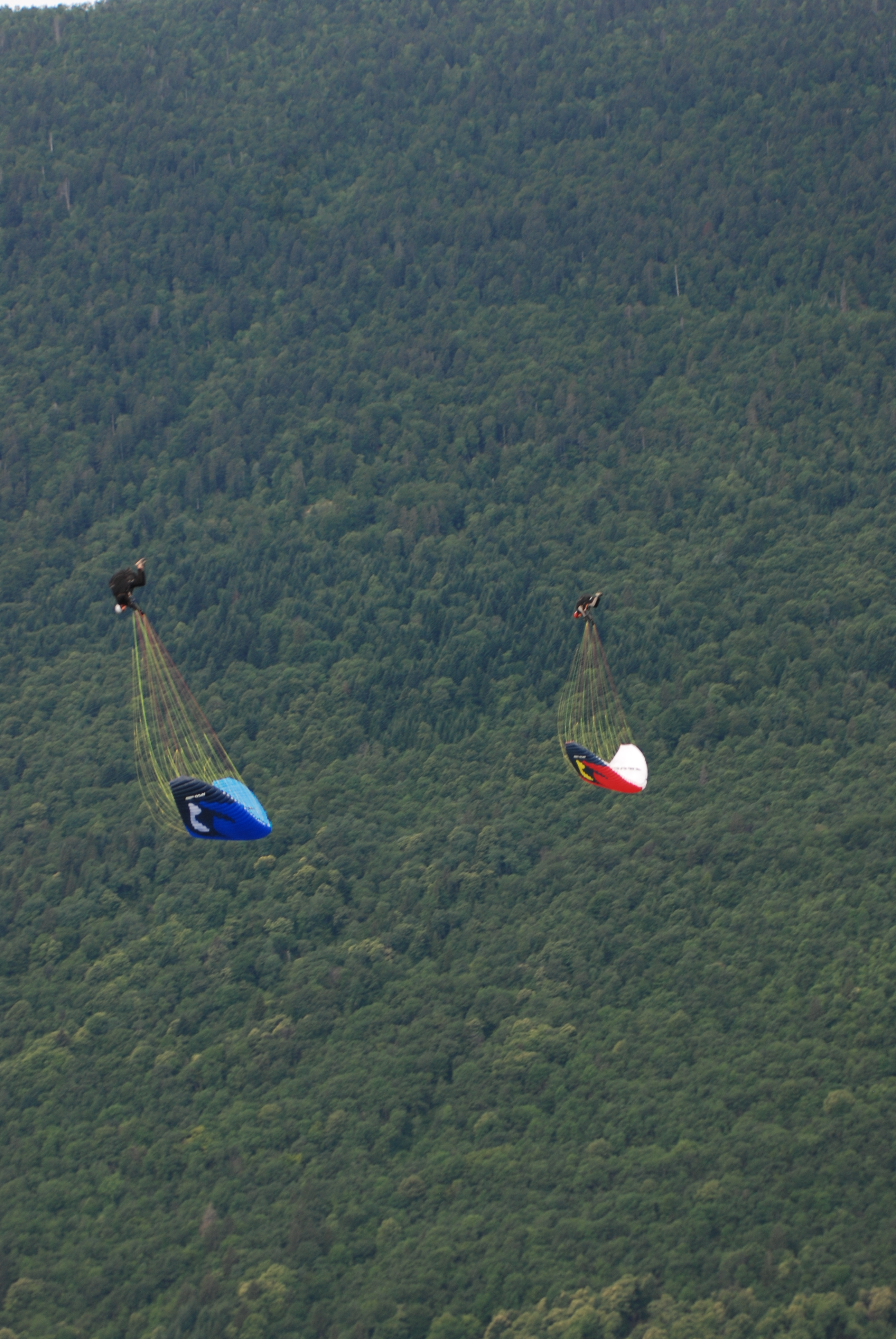 Infinity, figure de voltige de parapente réalisée par Pàl Takats et Gabor Kesi, synchronisés, lors de l'Acrolac 2007.